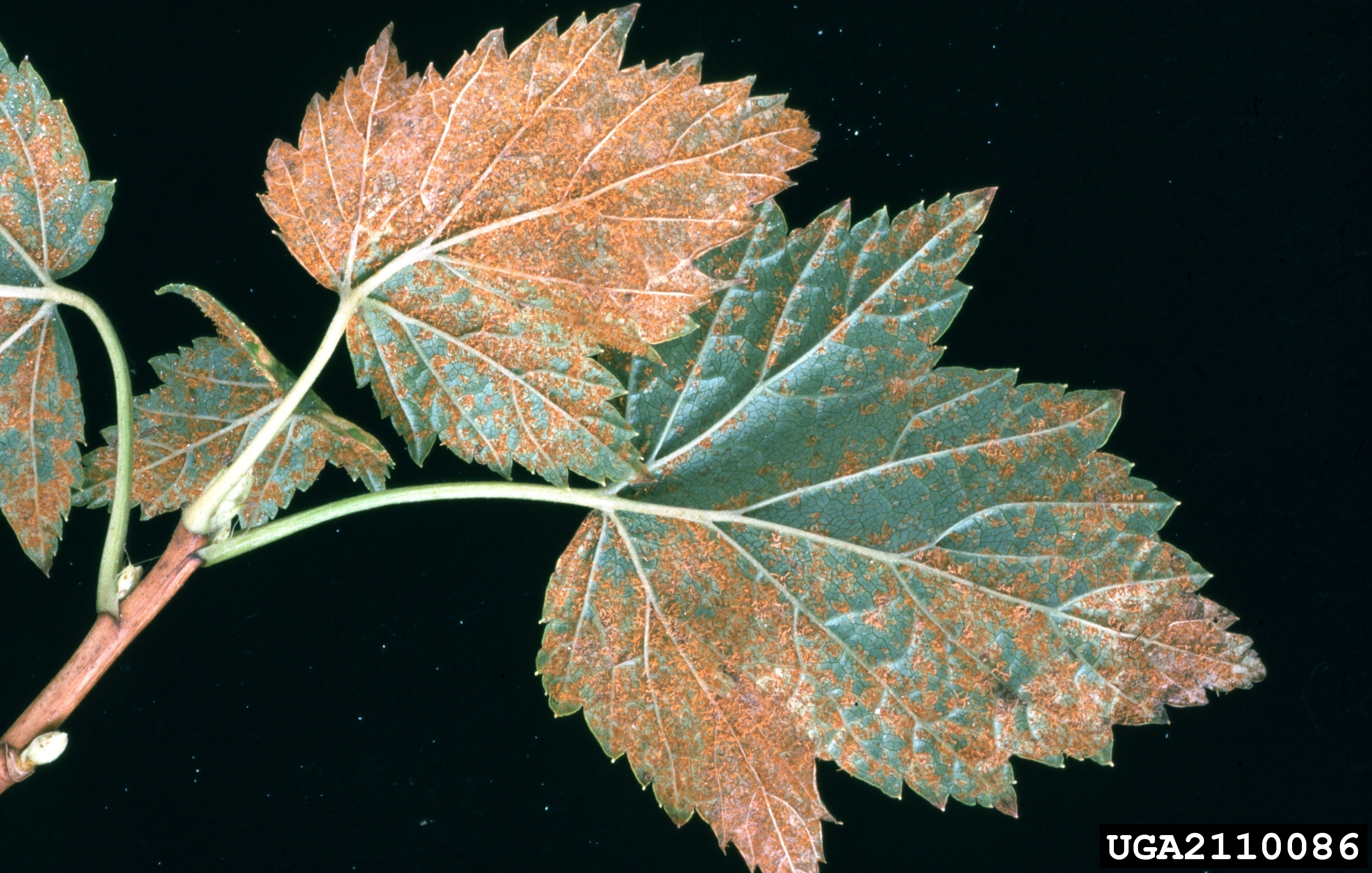 Cronartium_ribicola at Ribes nigrum: black currant telia